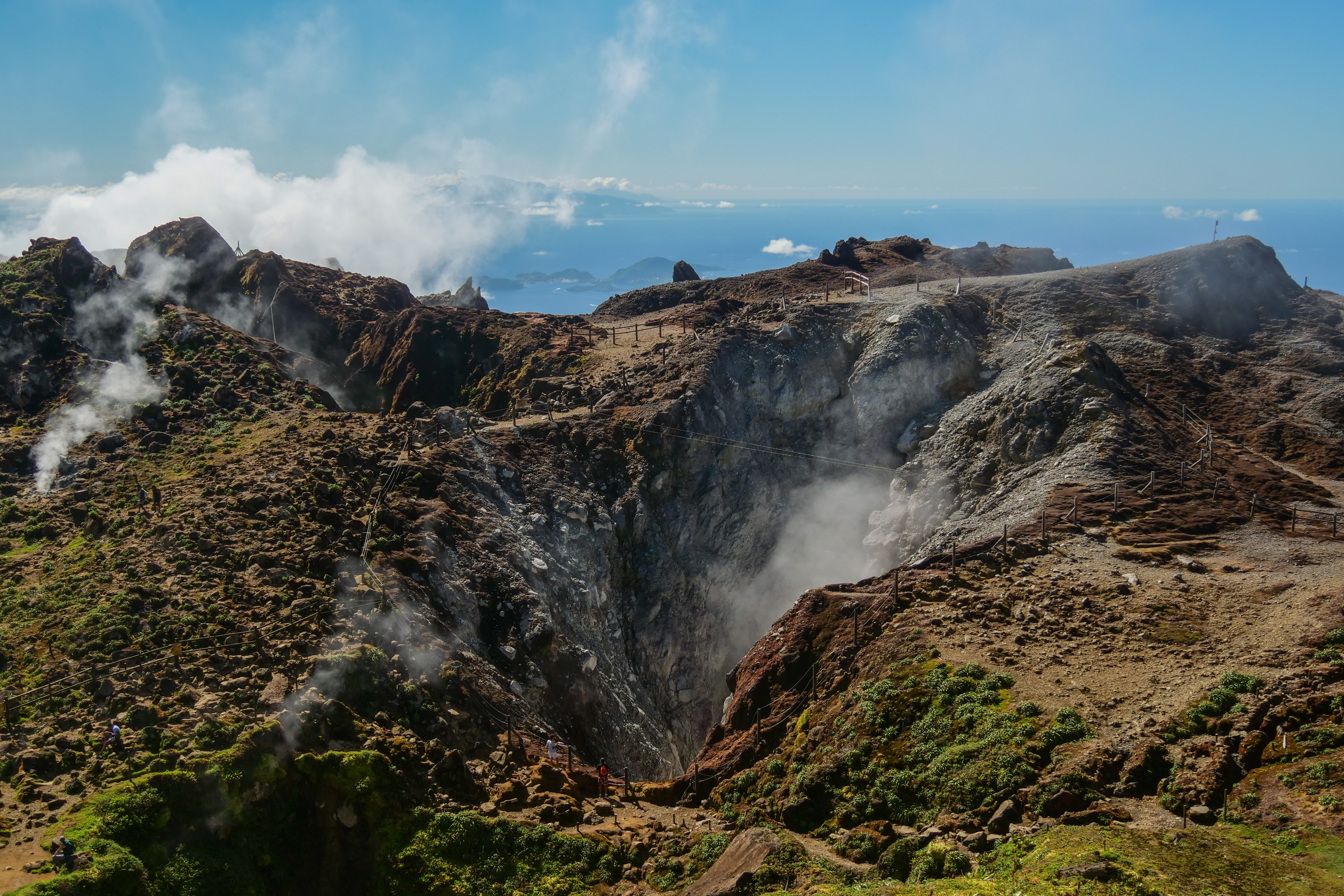 Vue sur les gouffres et bouches éruptives dégageant en permanence des fumerolles, zone située en contrebas du point accessible le plus haut sur le dôme de la Soufrière. Il s'agit du point culminent de la Guadeloupe et des Petites Antilles à 1467 m d'altitude.